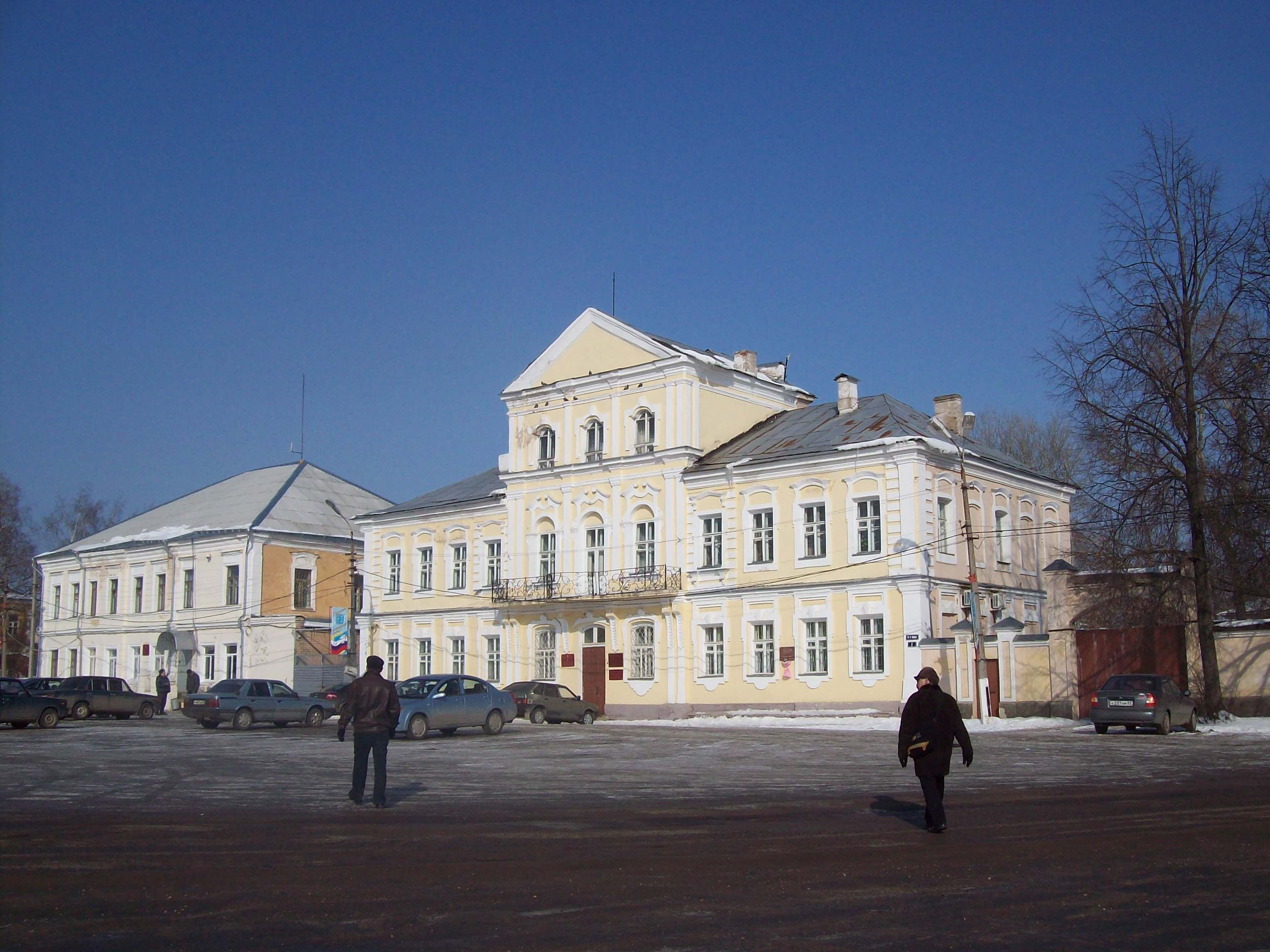 Магистрат (городская управа): площадь 9 Января, 1, 3, Торжок, Тверская область